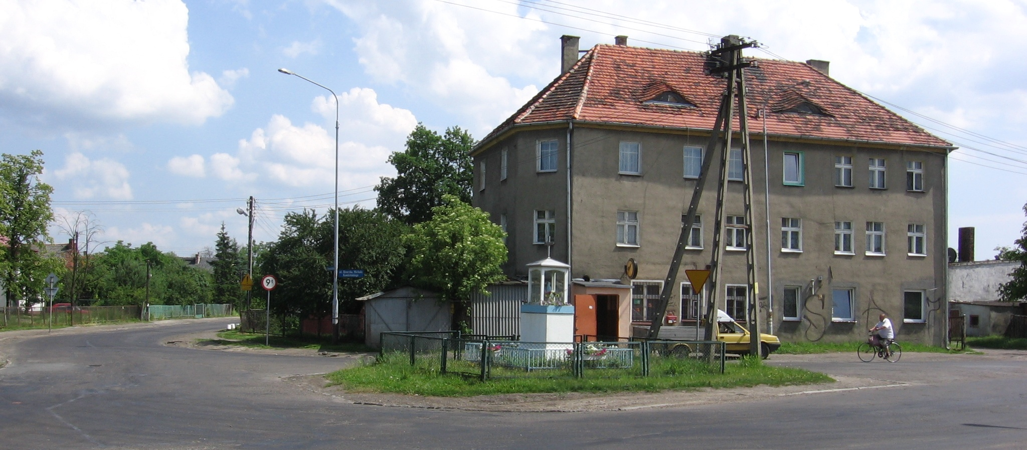 Wrocław, Poland - settlement Polanowice